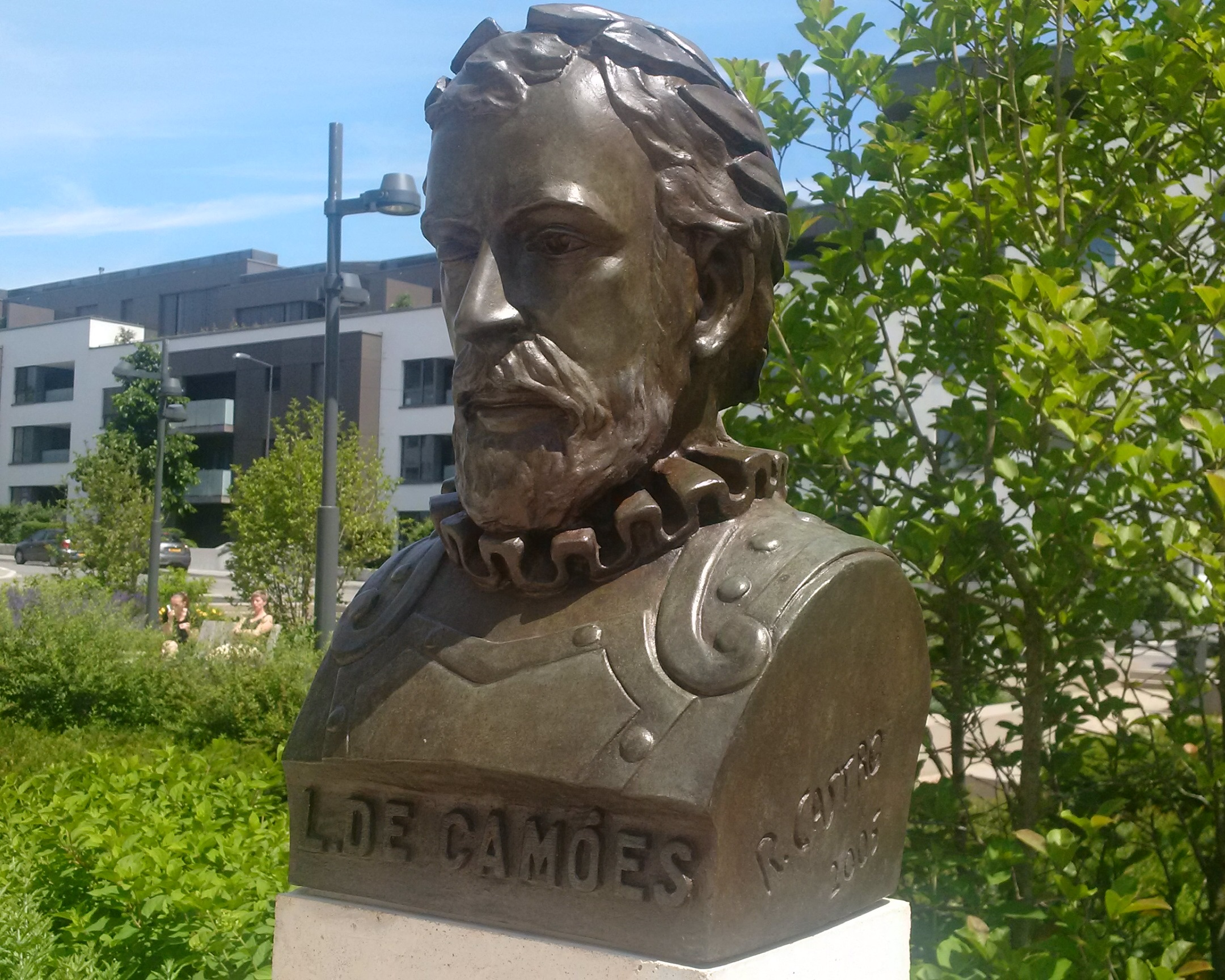 Buste de Luís Vaz de Camões; Luxembourg, place Joseph Thorn